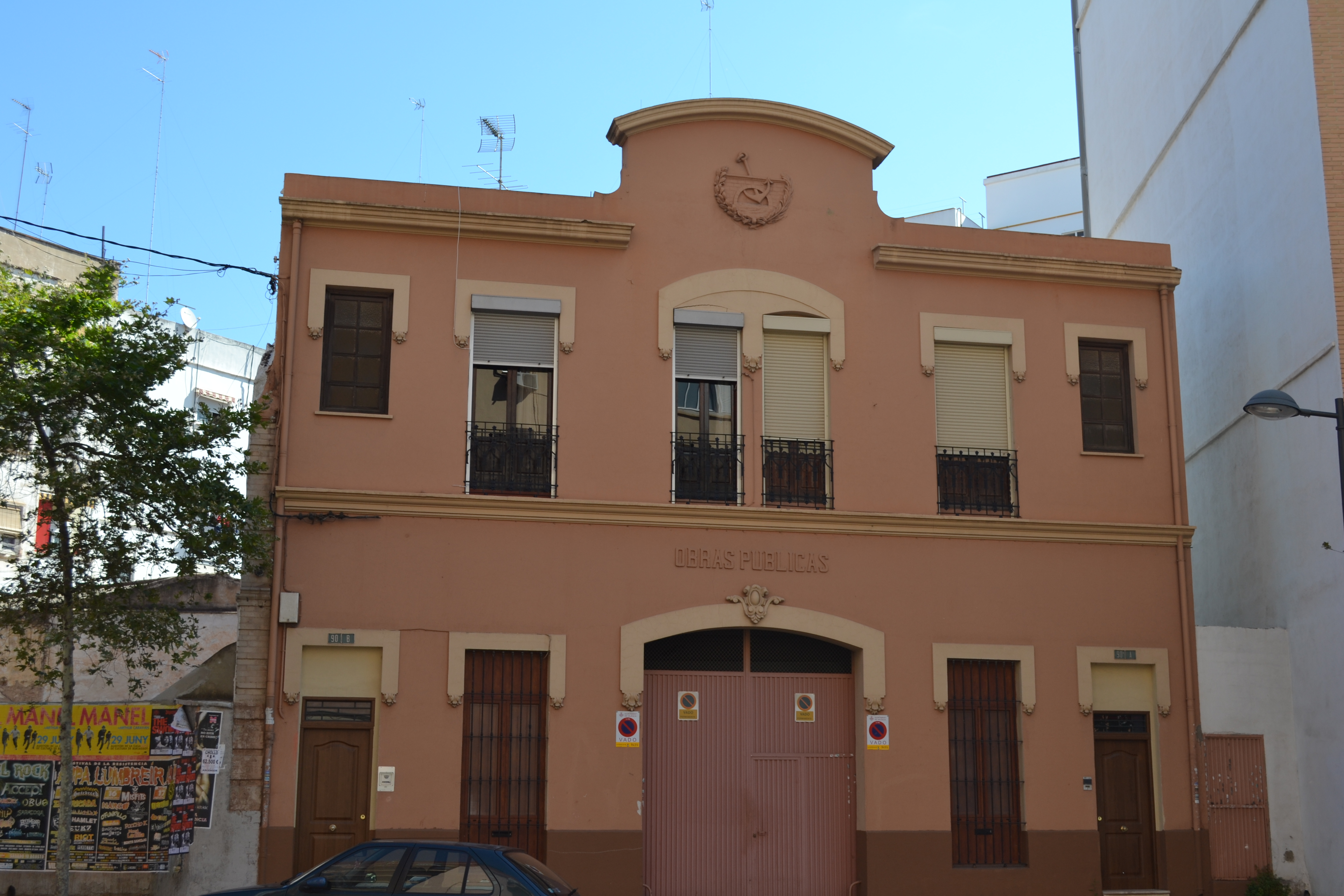 Casa de Obras Públicas en la Avenida de Burjassot, en los números 90 A y 90 B.